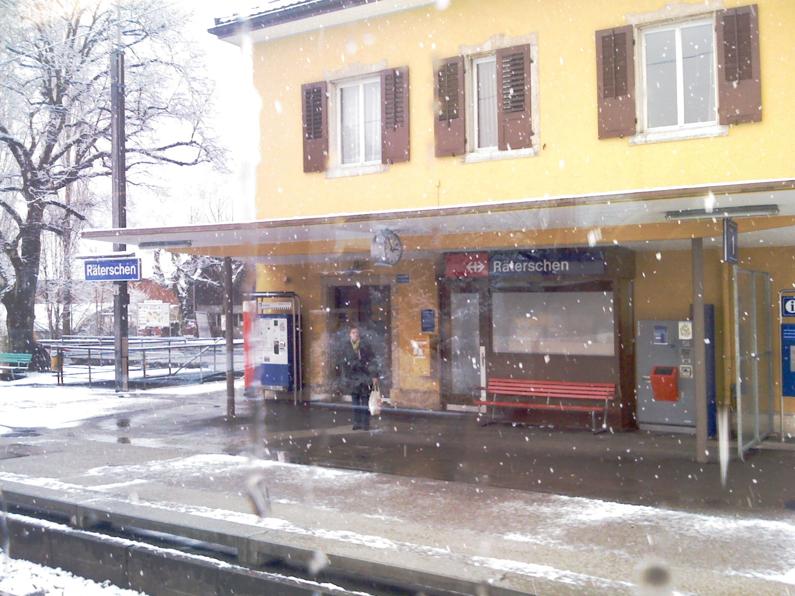 Räterschen station, Canton Zurich, Switzerland - Räterschen stacidomo, Kantono Zuriko, Svislando